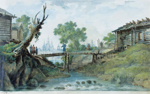 Беларуская (тарашкевіца): Дуброўна (Dubroŭna)